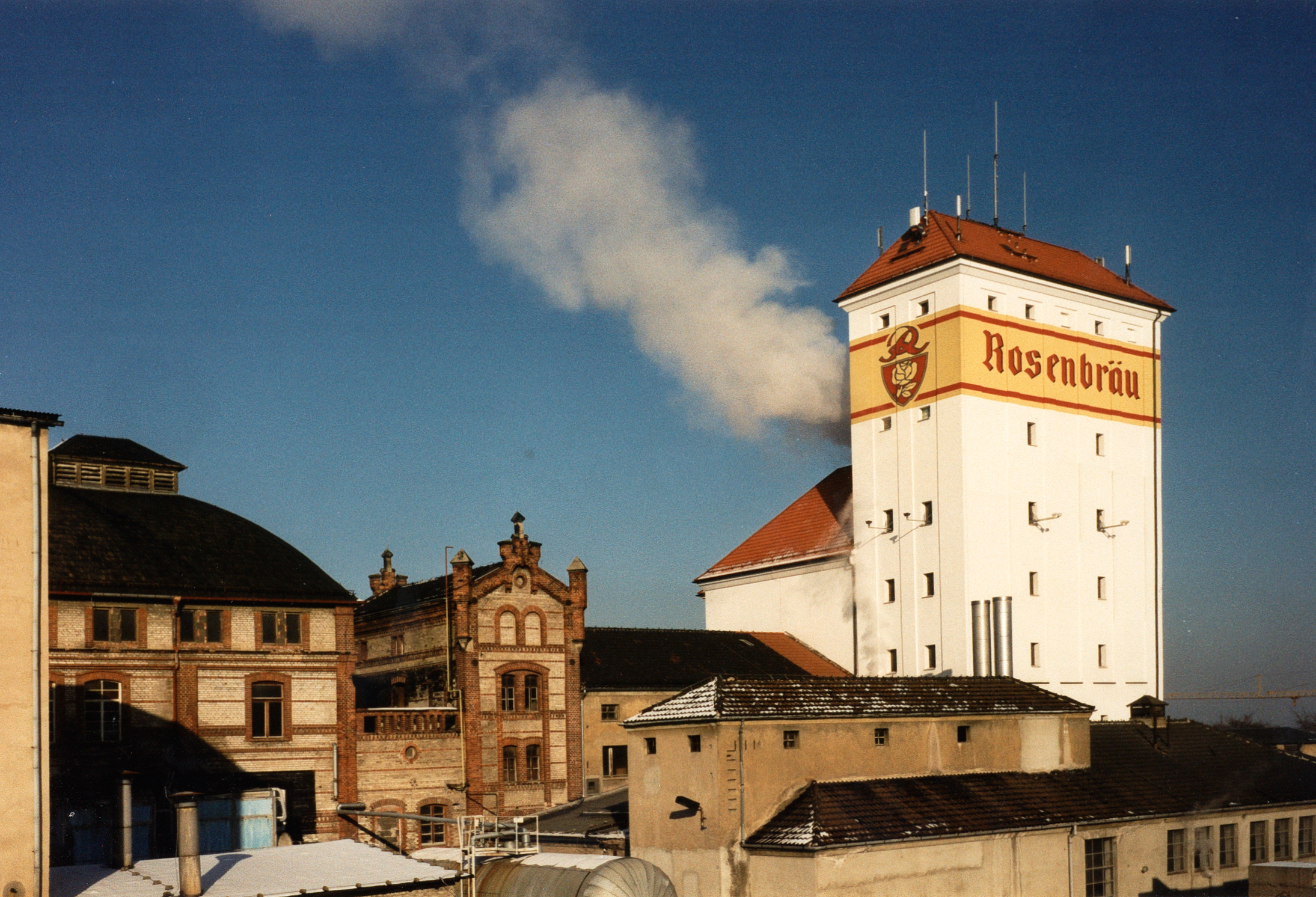 Foto aus Richtung oberer Bahnhof Pößneck auf das Brauereigelände im Jahre 1999